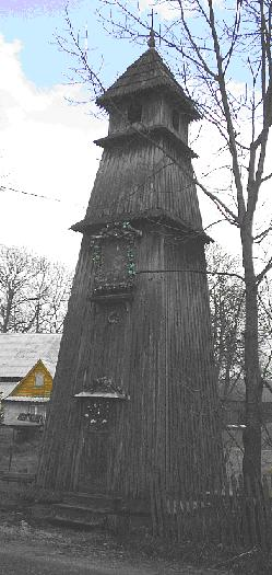 Dzwonnica w Koniówce przed pożarem 10 maja 2008 r.